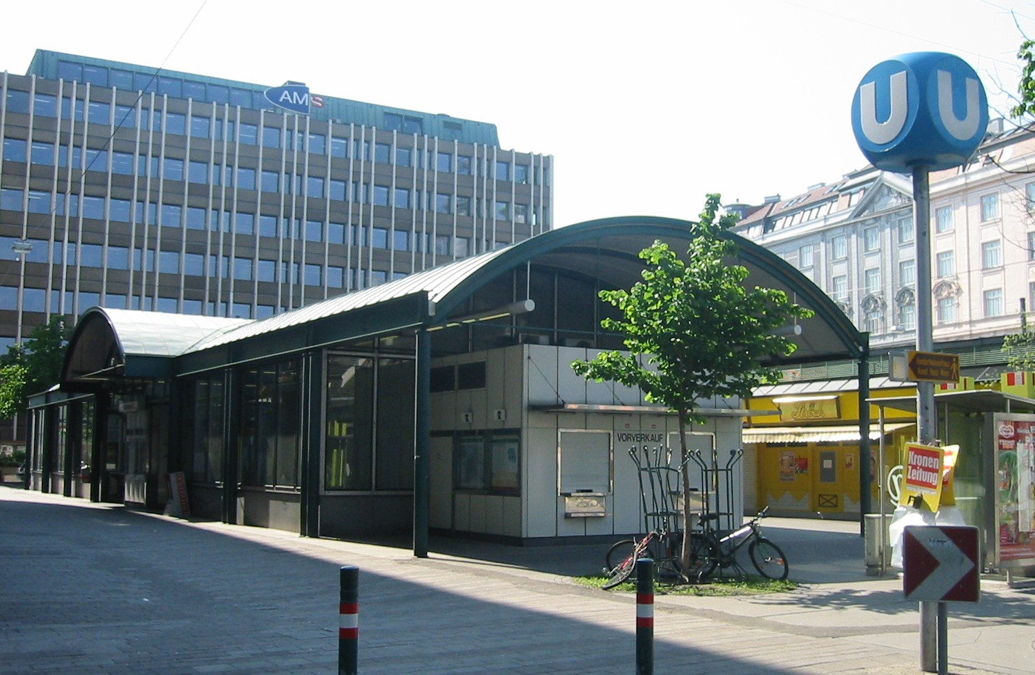 Wien U3 Rochusgasse